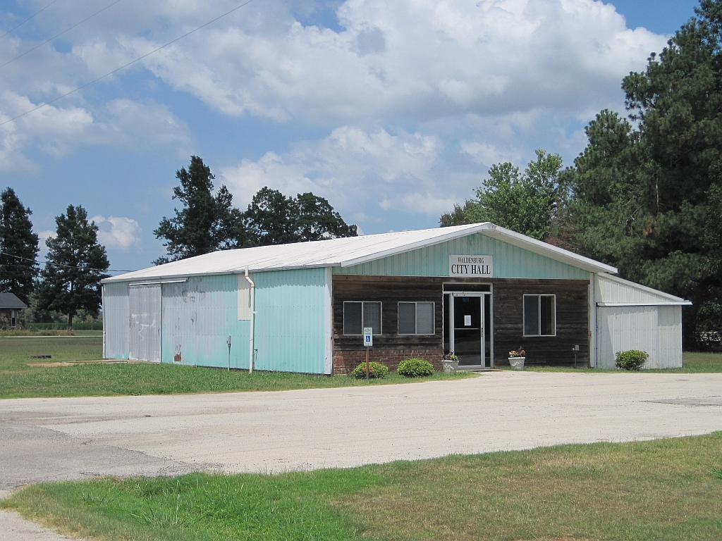 Waldenburg, Arkansas